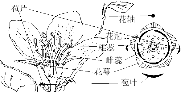 花的剖面图和花图示，自己画的 这是方洪渐自己画的，因为这个请求图片很长时间没有人上载，谁有更好的图片可以随时将他覆盖--方洪渐 08:57 2004年9月29日 (UTC)